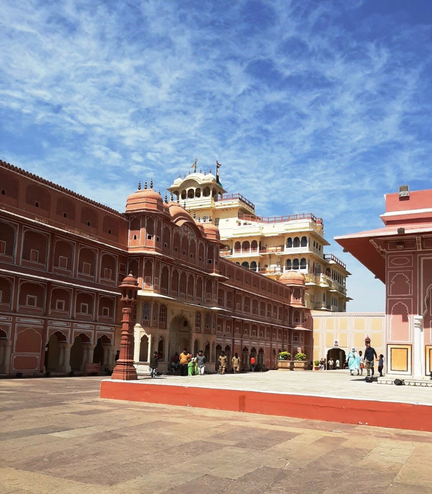 One of the palaces of Jaipur